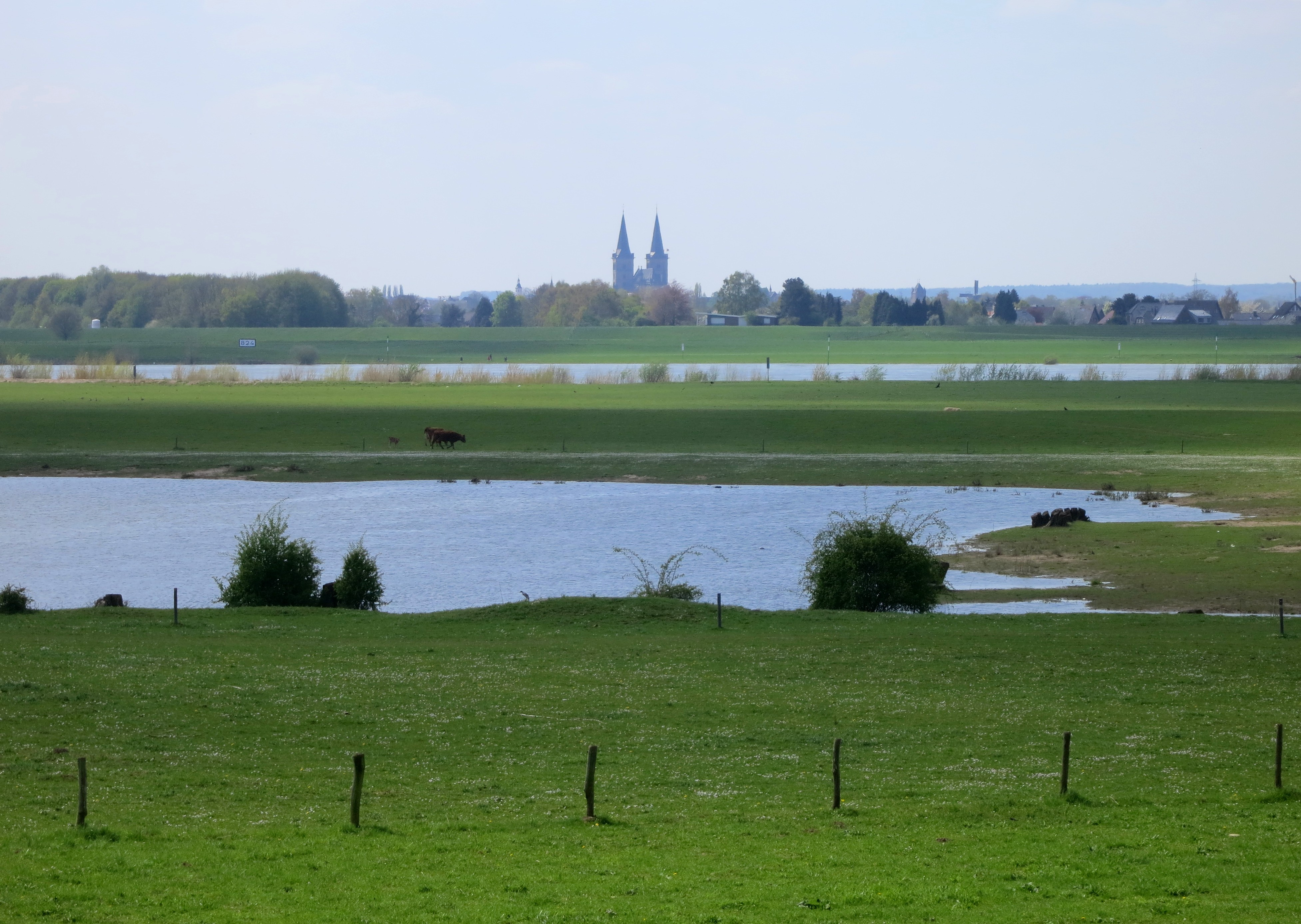 Blick von Wesel-Bislich über den Rhein (Höhe Rheinkilometer 824, Tafel links im Bild) nach Xanten (mittig Türme des Doms St. Viktor) – Weideland im Vordergrund bis zum Rhein vollständig im Naturschutzgebiet „Rheinaue Bislich-Vahnum“ (NSG WES-025) in Wesel (im Hintergrund die gegenüberliegenden Grünflächen im NSG WES-011 „Reeser Schanz, Rheinaue zwischen Obermörmter und Vynen, bei Gut Grindt und Haus Lüttingen“)